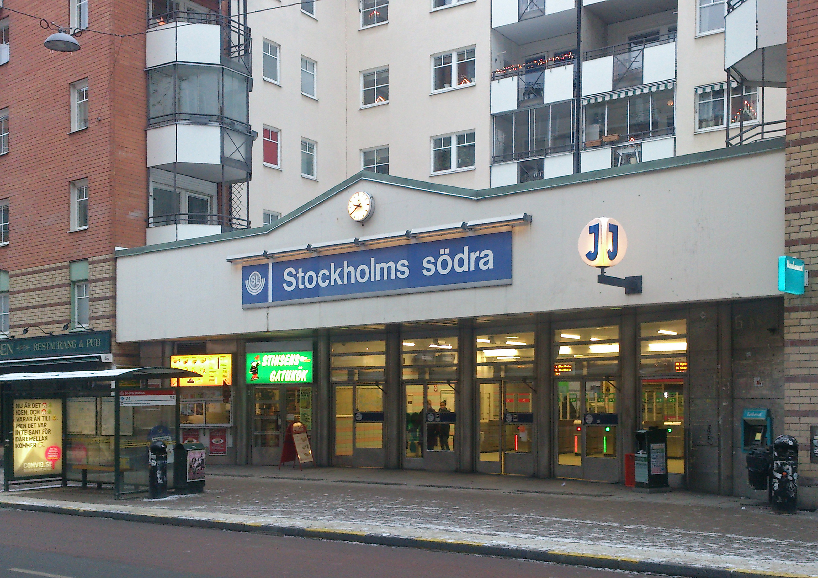 Stockholms södra station, ingång från Rosenlundsgatan